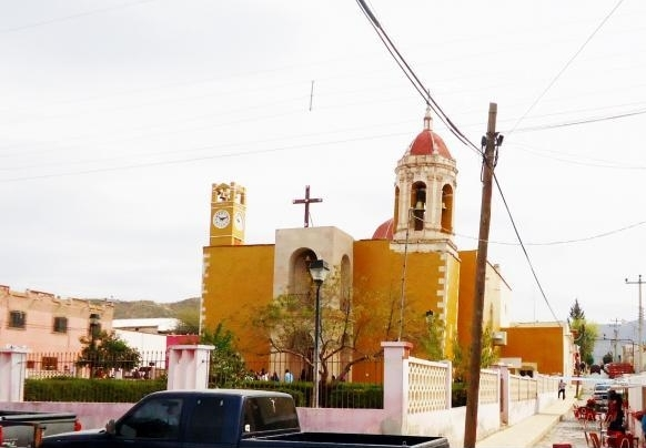 La Parroquia de Santa Ana, de estilo barroco del siglo XIX. Nazas, Durango. México. Camino Real de Tierra Adentro: Patrimonio Mundial de la Humanidad